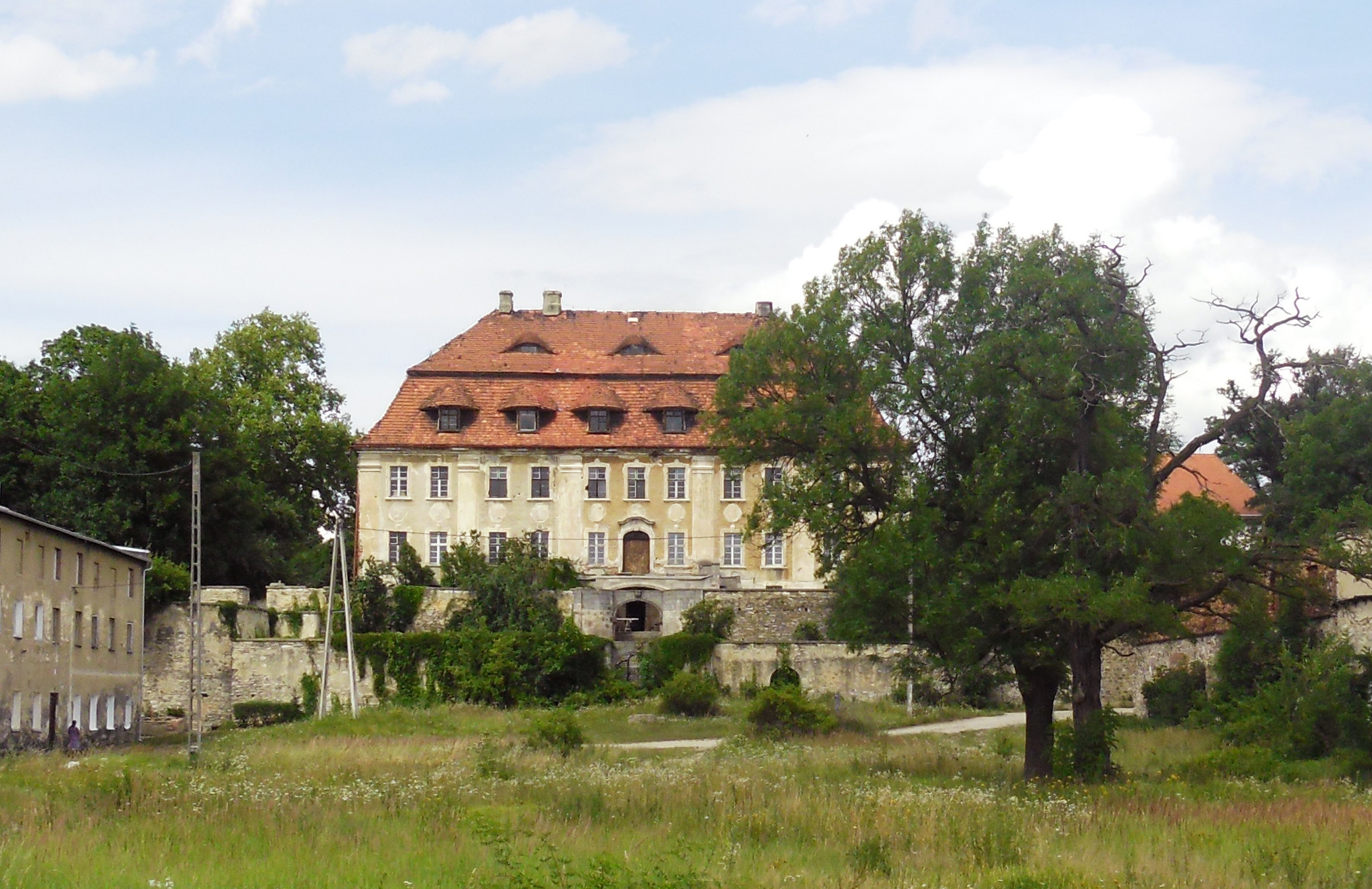 Żeleźnik - pałac, XVIII, 2 poł. XIX